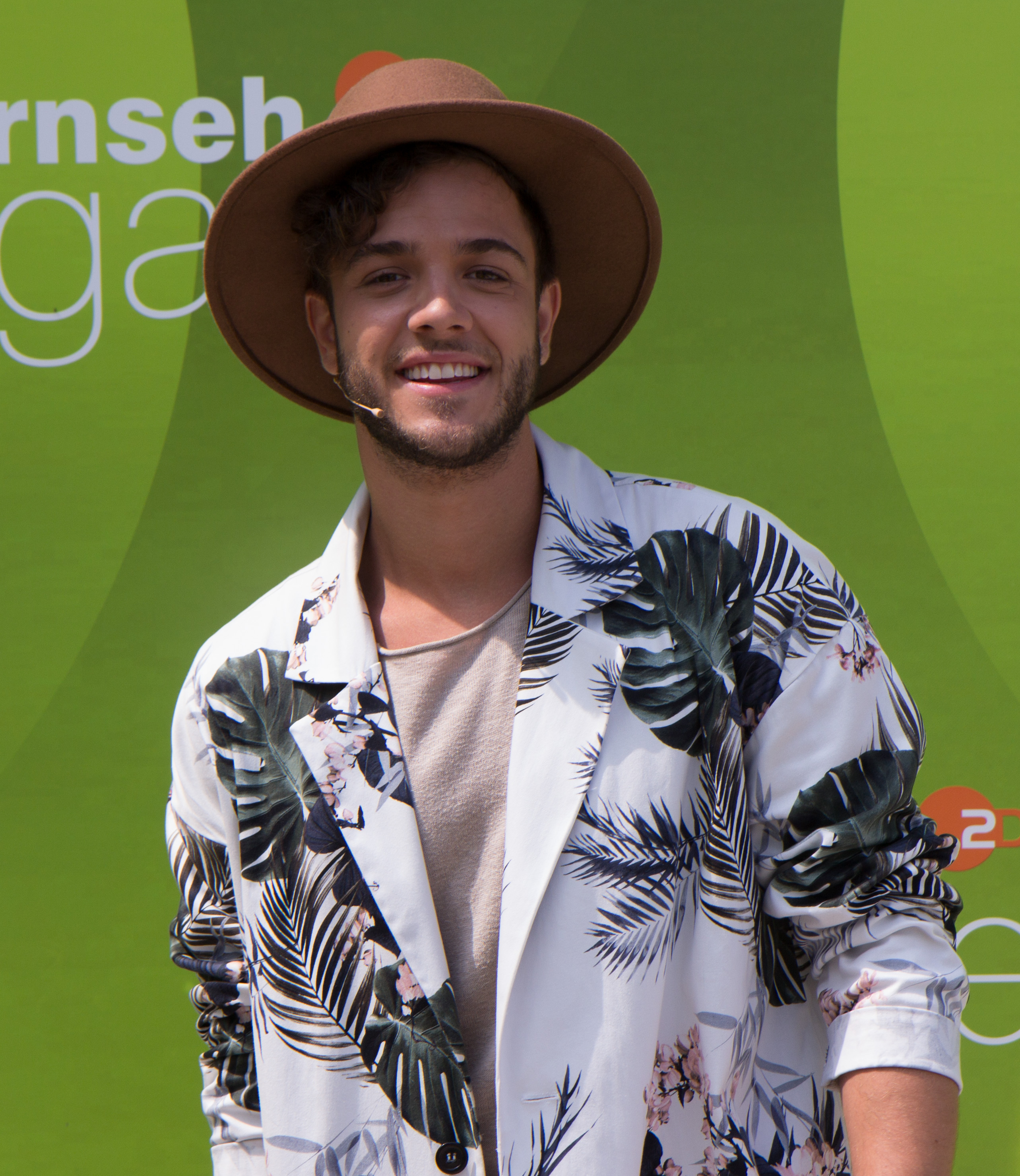 Luca Hänni als Gast beim ZDF-Fernsehgarten am 13. Mai 2018 in Mainz.